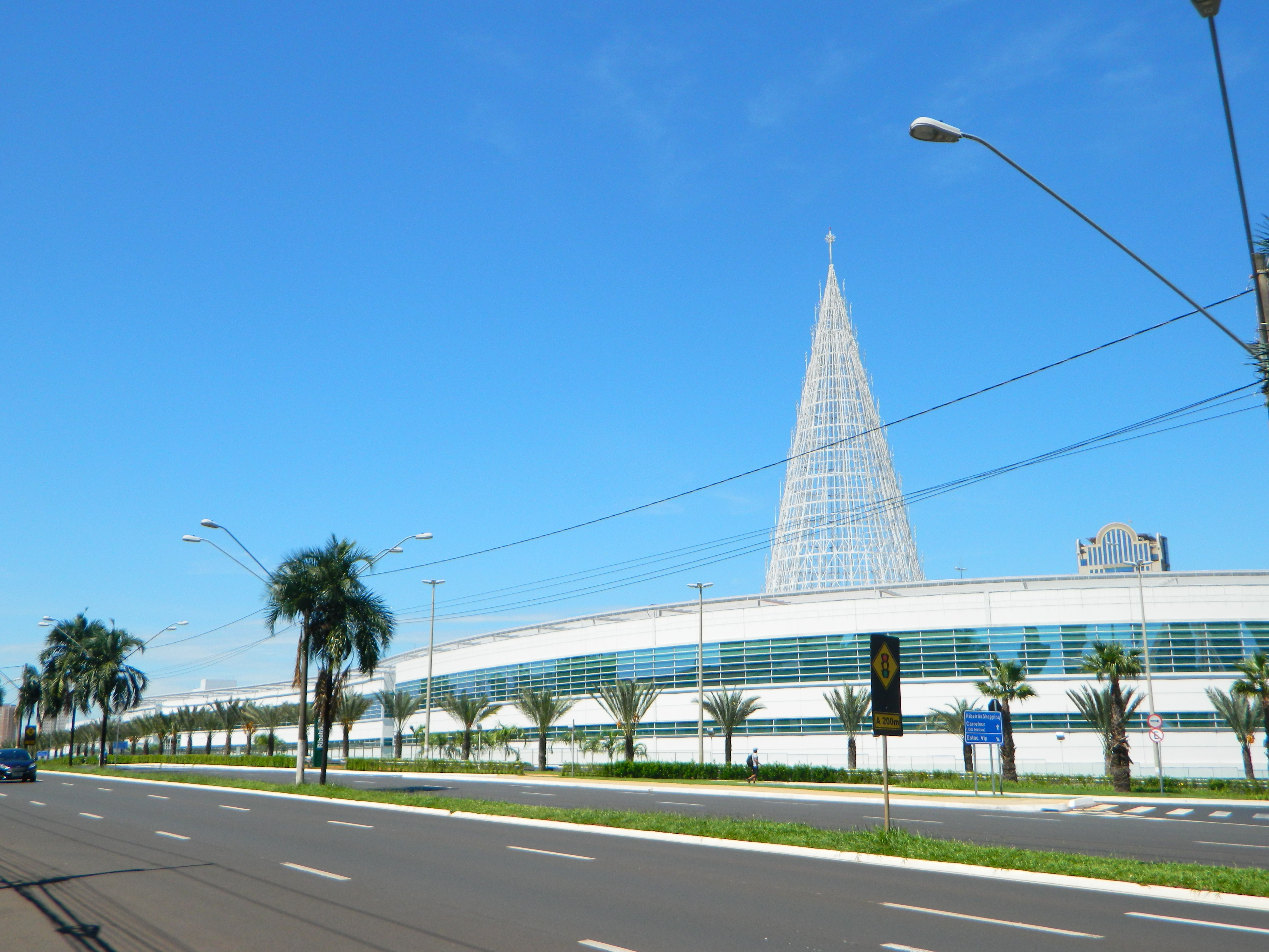 Fachada principal do Ribeirão Shopping em 2014